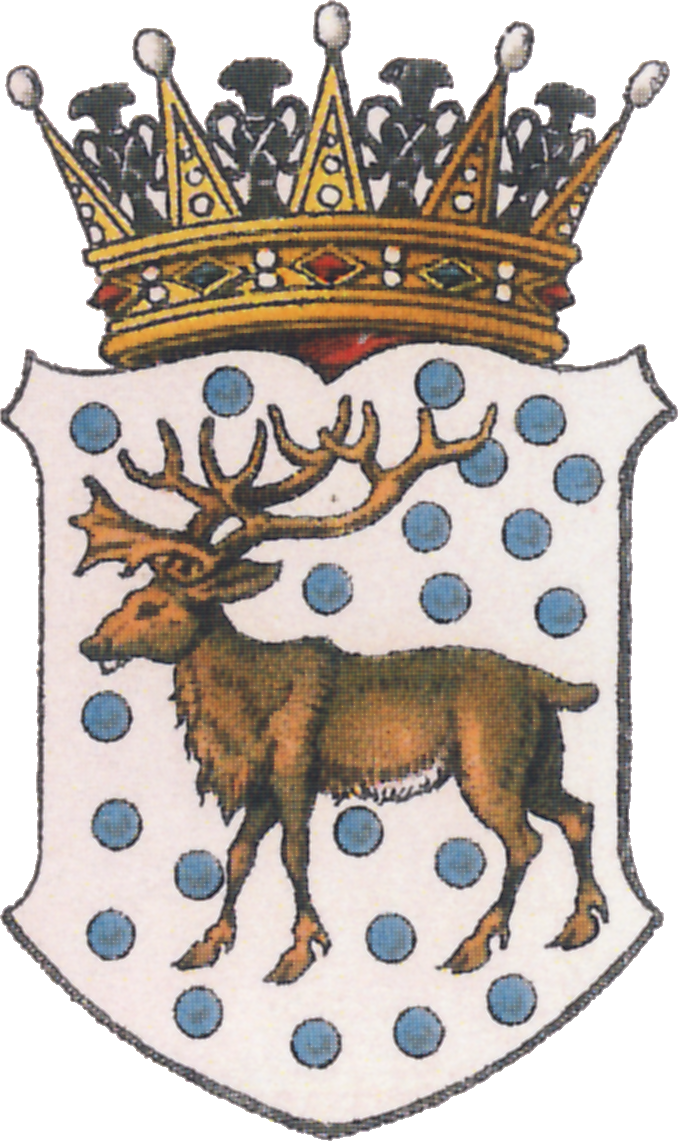 "Fig. 5. Wappen der schwedischen Landschaft Gestrikland, zum Gefleborg-Län gehörig. Im silbernen mit blauen Kugeln bestreuten Felde, ein schreitendes braunes Renntier. Der Schild ist mit einer rotgefütterten, schwedischen Herzogskrkone, aber ohne Haube (vergleiche Tafel XV. Fig. 37) geschmückt."